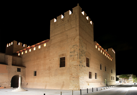 Exterior del Castell d'Alaquàs